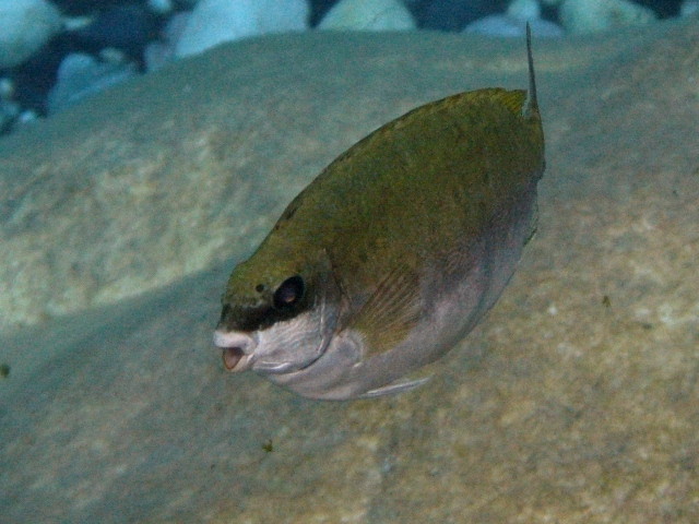 Siganus luridus en Donoussa, Grecia, de 14 cm de largo. 2010